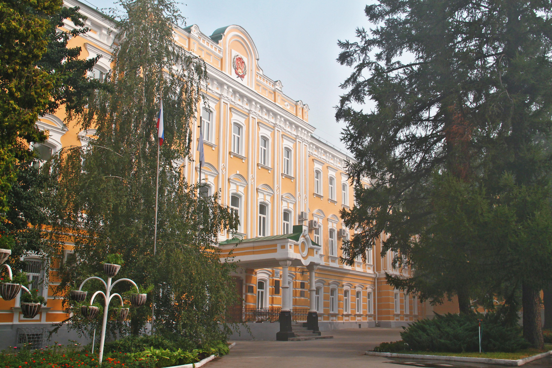 Рязанский государственный университет имени С.А.Есенина. главное здание на ул.Свободы.